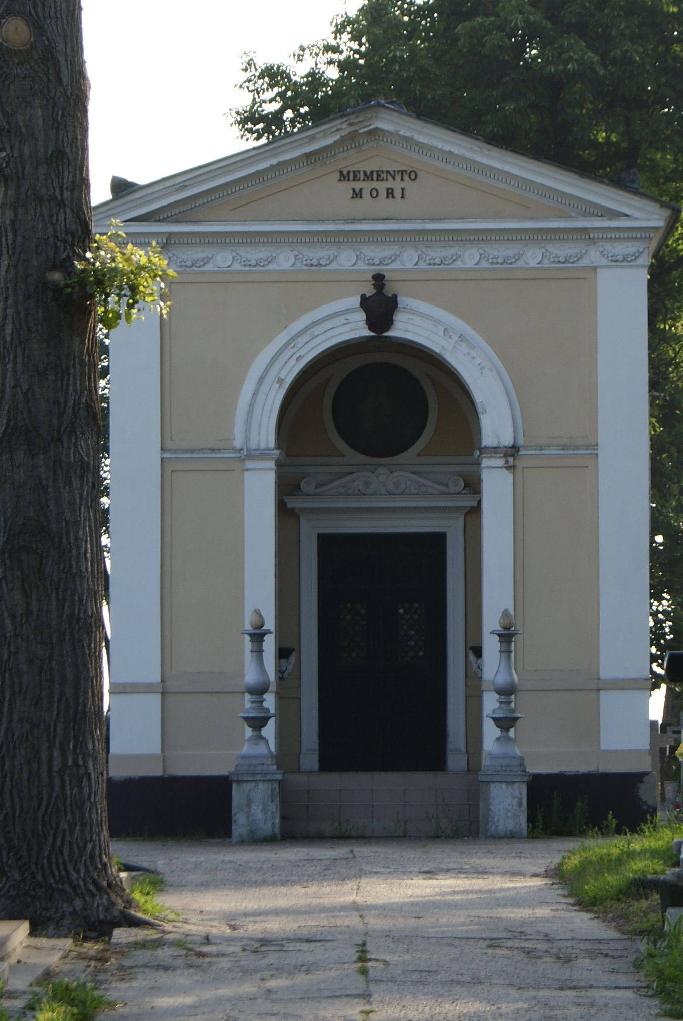 Karczew - kaplica cmentarna Bielińskich (zabytek nr 1044/747)